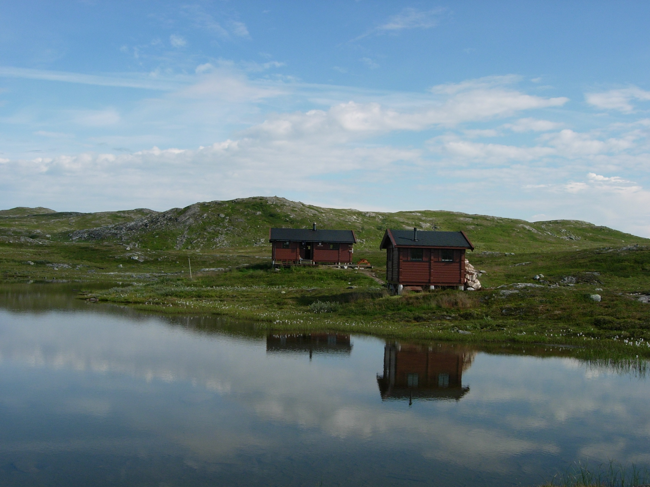 Bodø og Omegns Turistforenings hytte Tverrbrennstua, 555 m.o.h.